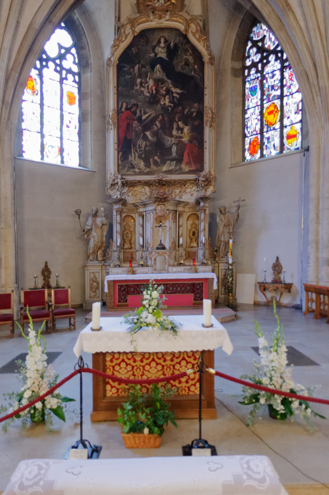 Michaelskirche Barocker Hochaltar